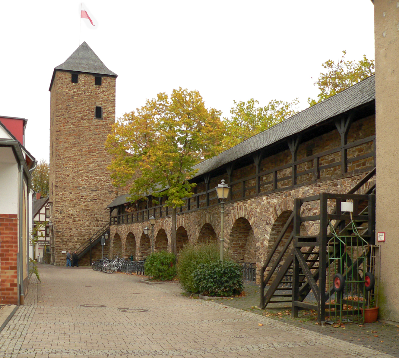 Wehrgang der Stadtbefestigung Ahrweiler